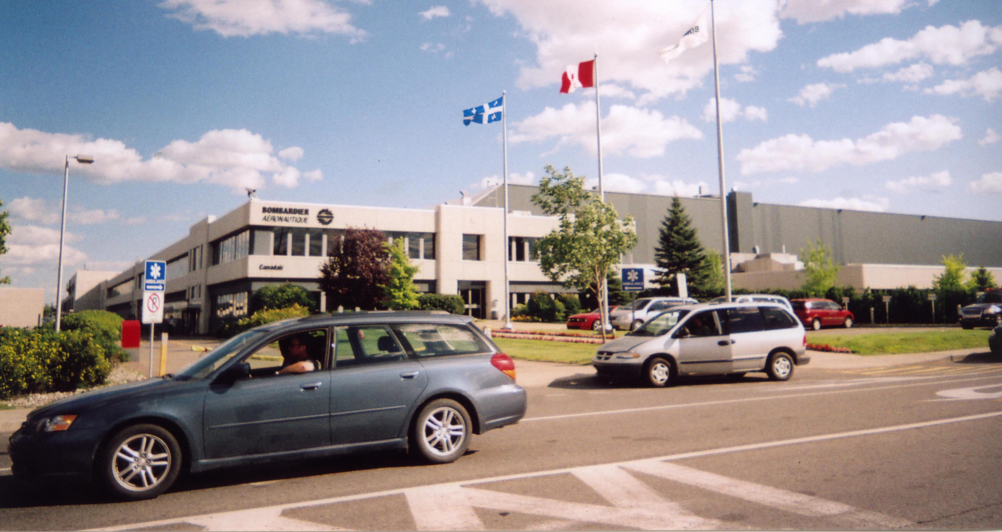 Usine principale de Canadair, une filiale de Bombardier Inc., située à Saint-Laurent, un arrondissement de Montréal, Canada. - Main plant of Canadair, a subsidiary of Bombardier Inc, located in Saint-Laurent, a borough of Montreal, Canada.